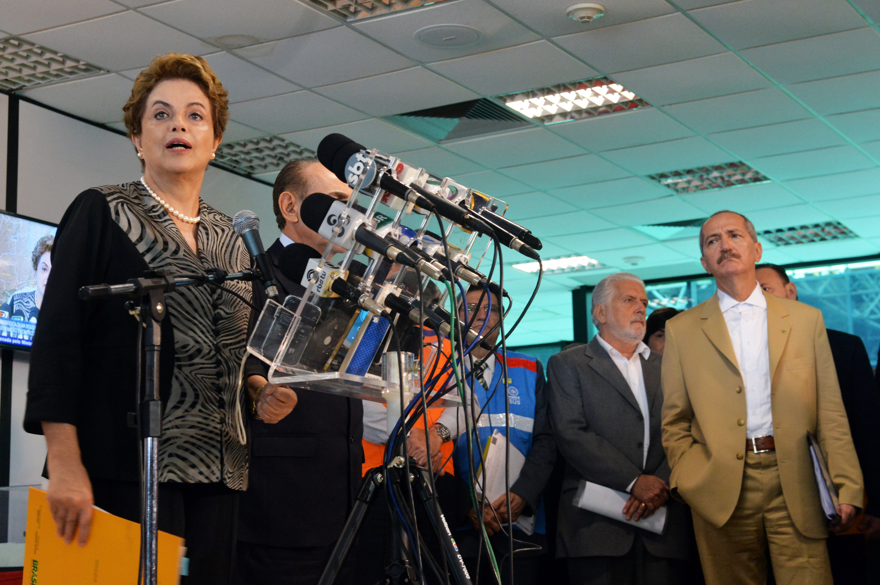 29/01/2016, Brasília - DF Fotos: Tereza Sobreira